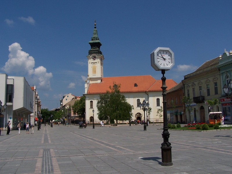 Sombor. Orthodoxe St. Georgskirche (Sv. Dorda) von 1759.